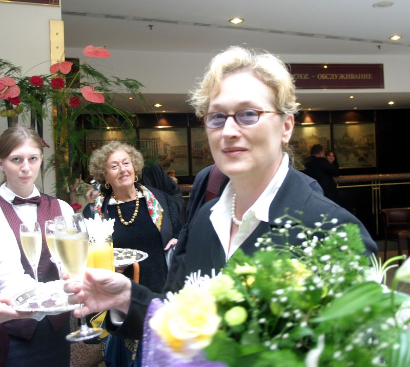 Meryl Streep in St-Petersburg, Russia